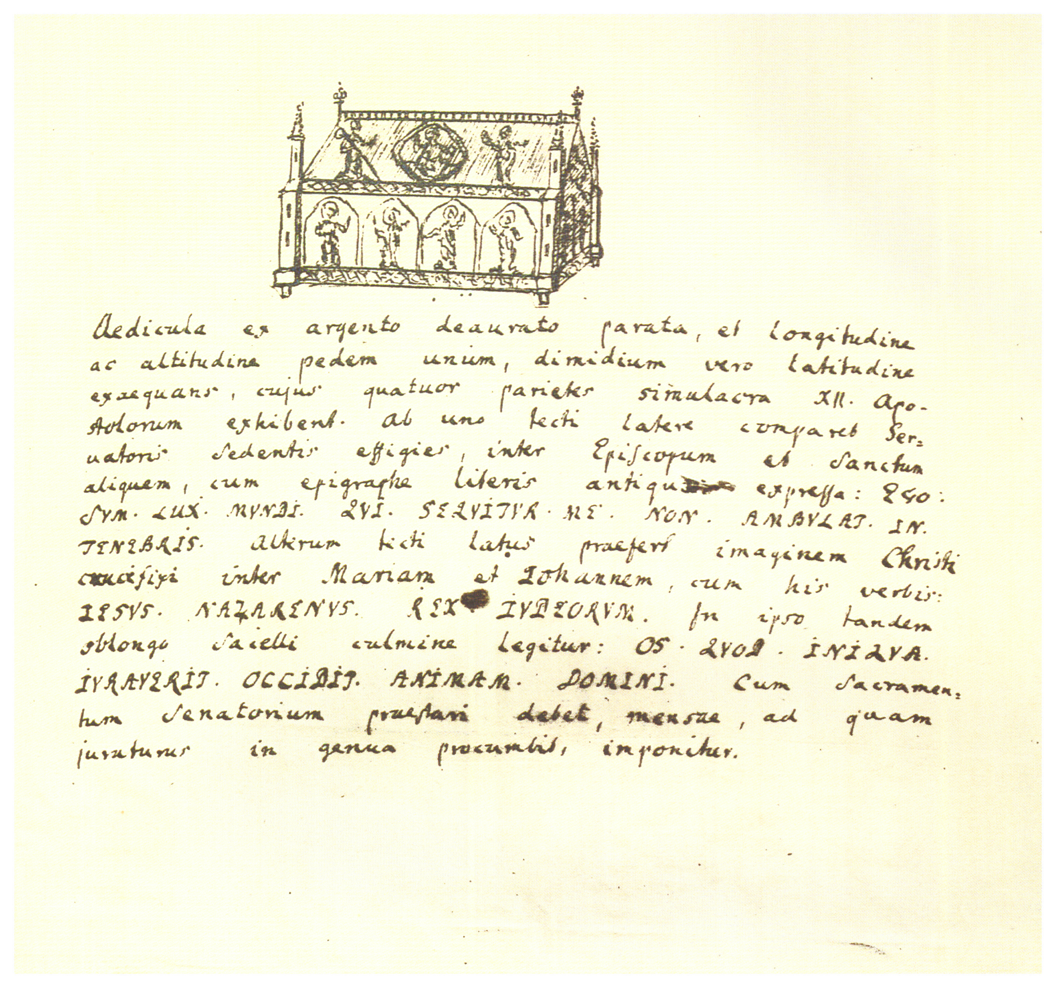 Federzeichnung der seit 1811 verlorenen spätgotischen Lübecker Eideskapelle des Lübecker Rathauses in Form eines gotischen Reliquiars durch den Lübecker Syndicus Carl Henrich Dreyer im Besitz des Archivs der Hansestadt Lübeck (Museum Dreyerianum Bl. 190). Sie war nach den Beschreibungen silbervergoldet, einen (Lübecker) Fuß hoch wie lang und hatte ein Gewicht von 848 Gramm (=58 Lot). Literatur: Friedrich Bruns, Hugo Rahtgens, Lutz Wilde: Die Bau- und Kunstdenkmäler der Hansestadt Lübeck. Band I, 2. Teil: Rathaus und öffentliche Gebäude der Stadt. Max Schmidt-Römhild, Lübeck 1974, S. 269/270, ISBN 3-7950-0034-3 ; Antjekathrin Graßmann: Lübeckische Geschichte, 2. Auflage, Lübeck 1989, S. 545: "auf ausdrücklich Befehl Louis-Nicolas Davouts nach Hamburg abgelefert"...